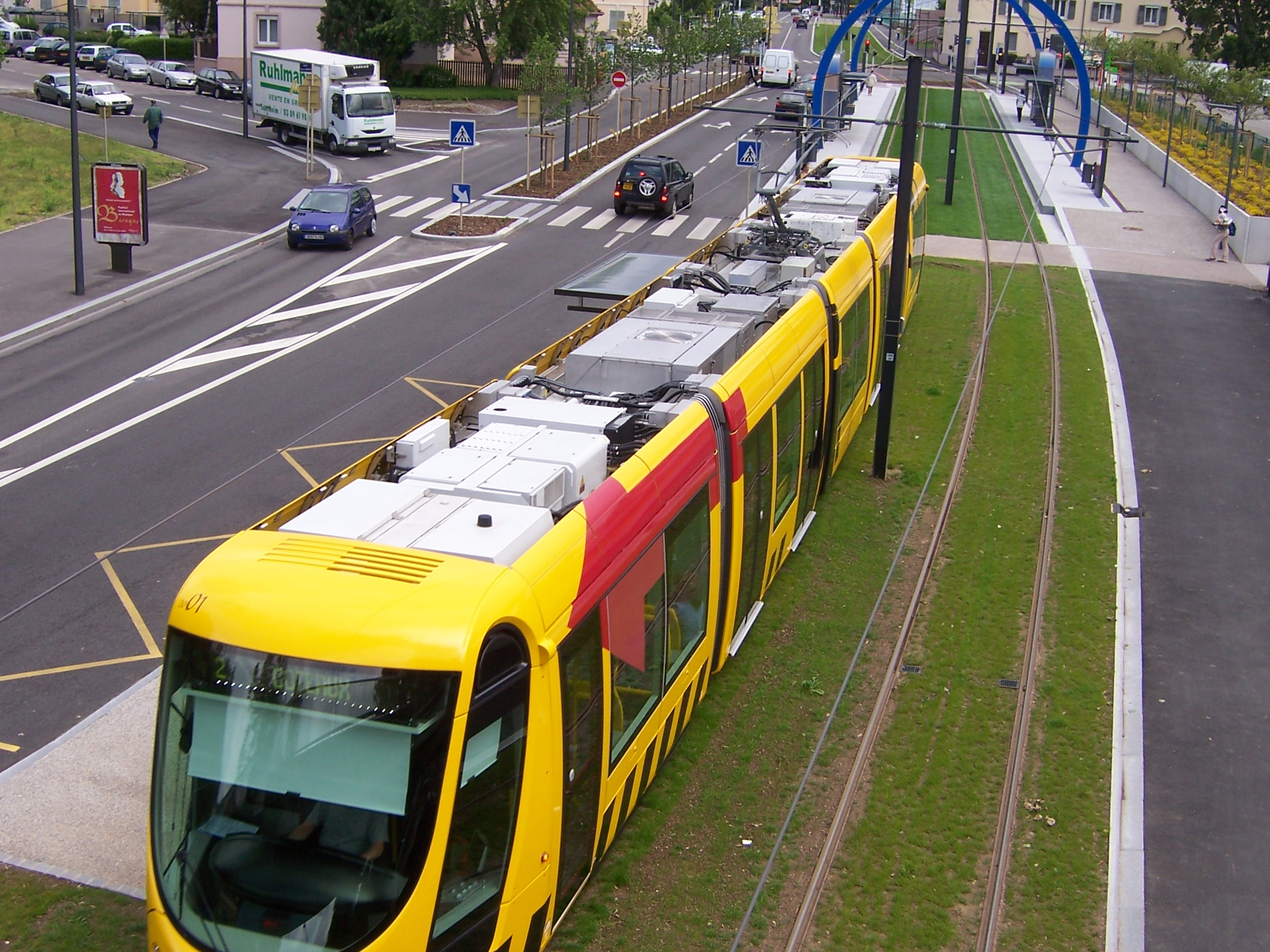 Une rame Citadis 302 numéro 2001 baptisée « Mulhouse » du tram de Mulhouse, vue de haut, vers la station Daguerre.